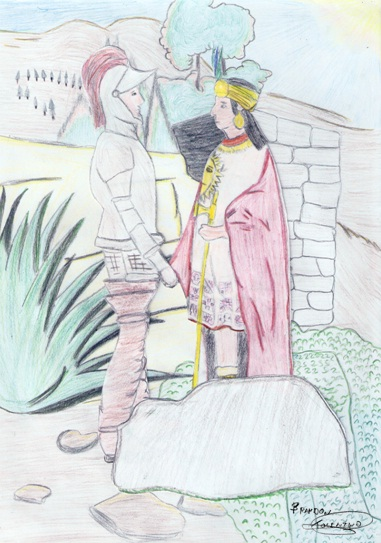 Este es un dibujo de la paz de acobamba